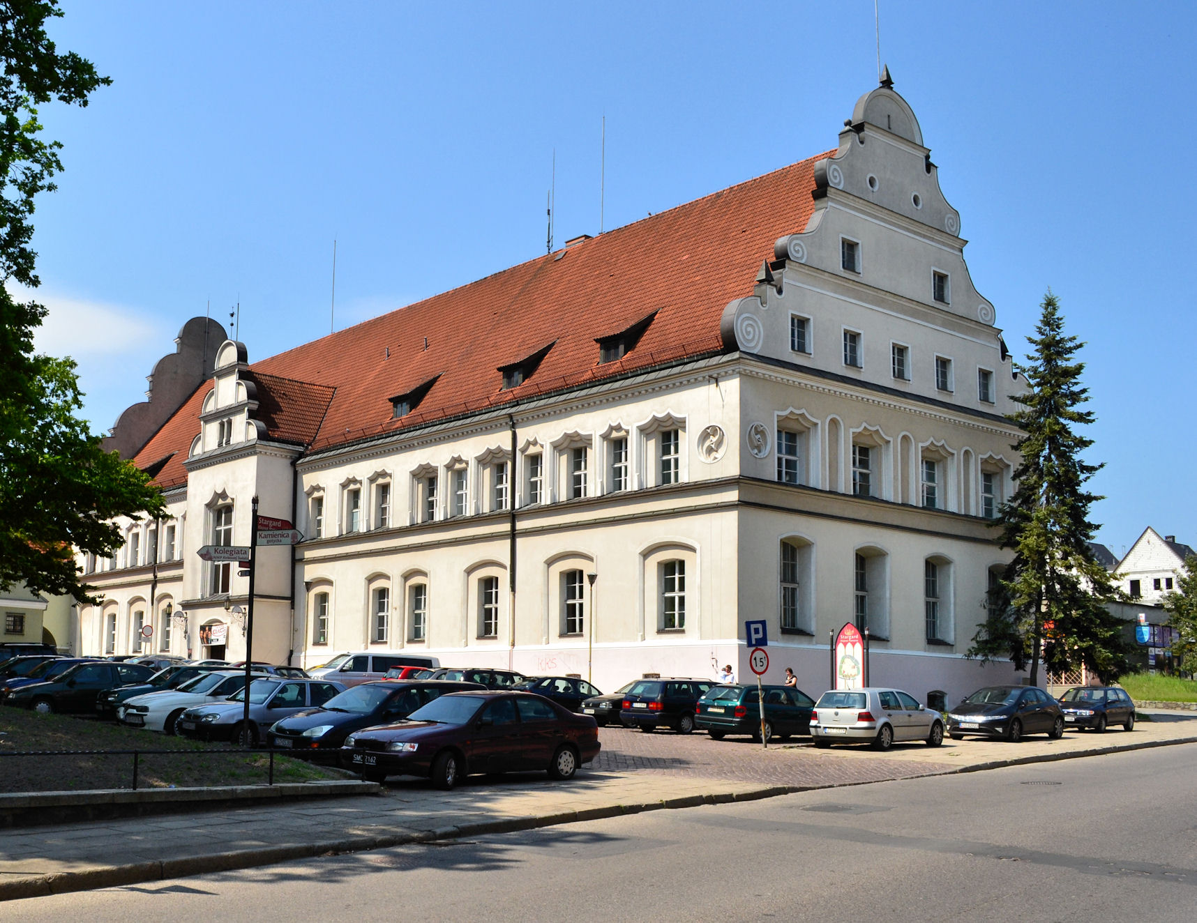 Ratusz w Stargardzie Szczecińskim